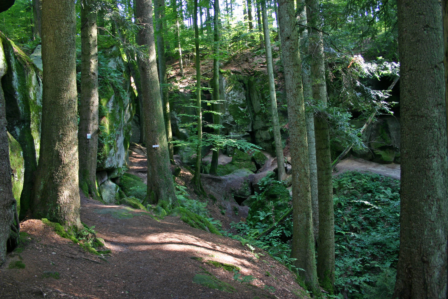 Wanderpfad in der Hägelesklinge bei Cronhütte im Naturschutzgebiet „Hägeles- und Brunnenklinge“, Naturpark Schwäbisch-Fränkischer Wald